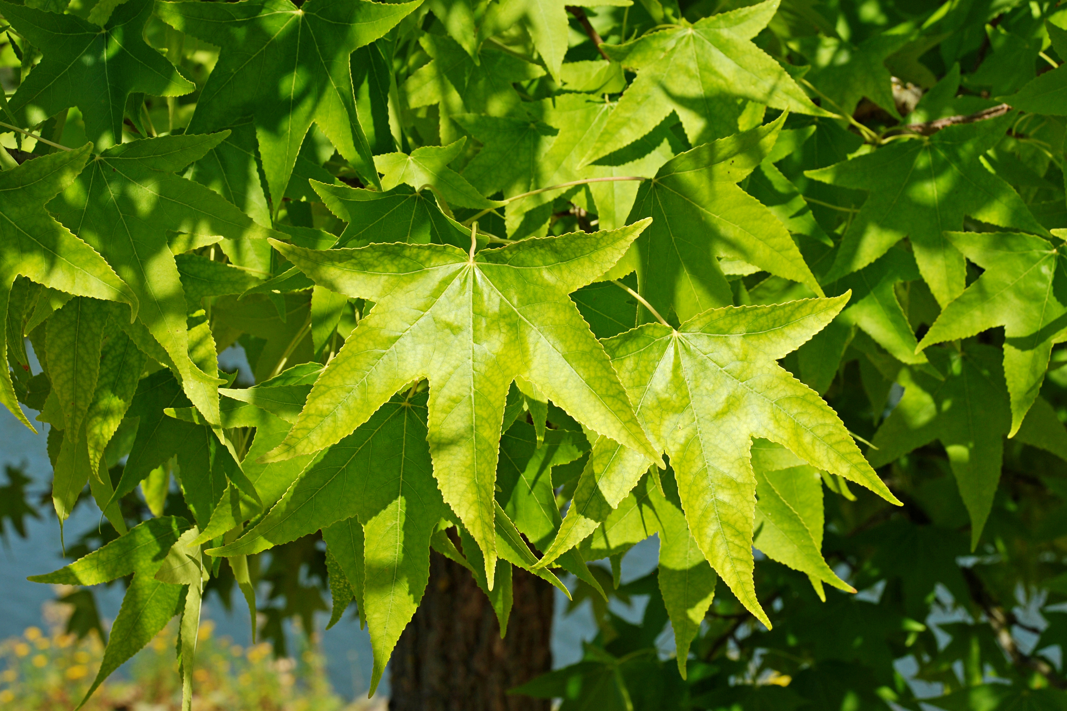 Belgique - Brabant wallon - Ottignies-Louvain-la-Neuve - Lac de Louvain-la-Neuve - Copalme